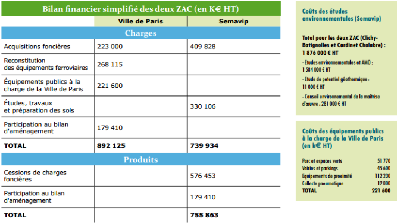 Bilan financier Clichy-Batignolles